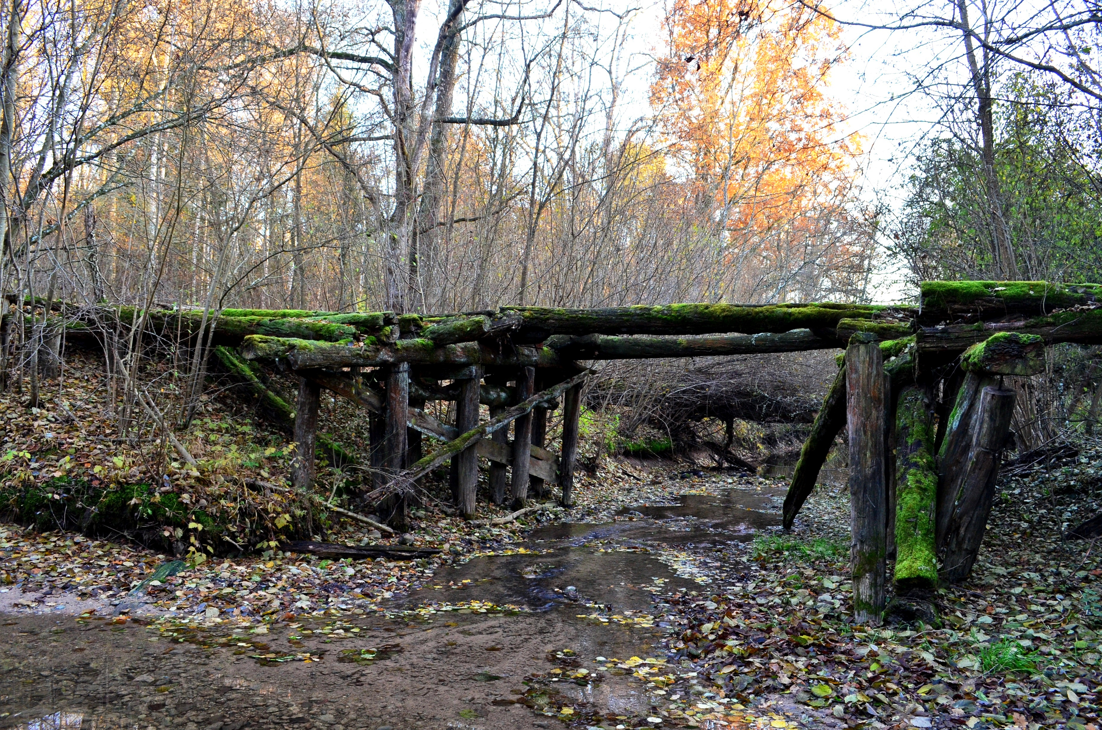 Senas tiltas per Šumerą, Ilgatrakio miškas, Kėdainių raj.